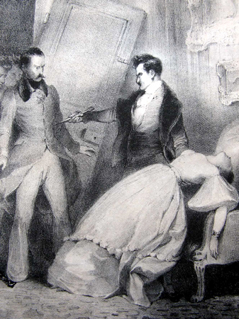 Antony, di Alexandre Dumas padre, scena finale del V atto, stampa.